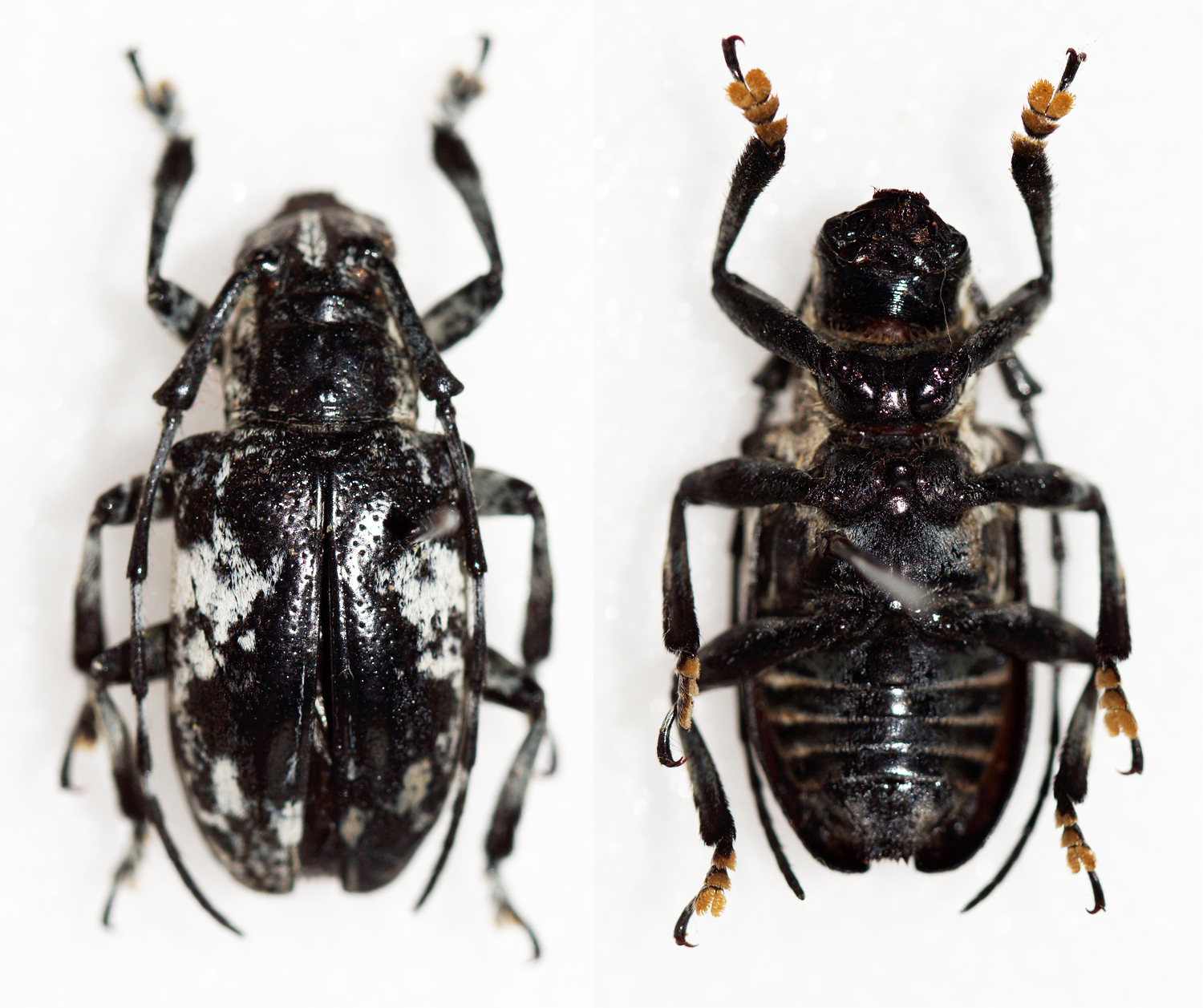 Hudepohl,1985 Sex: ? Data: 08-2014 - Kabanglasan - Bukidnon - Mindanao - Philippines Size: 17.5mm